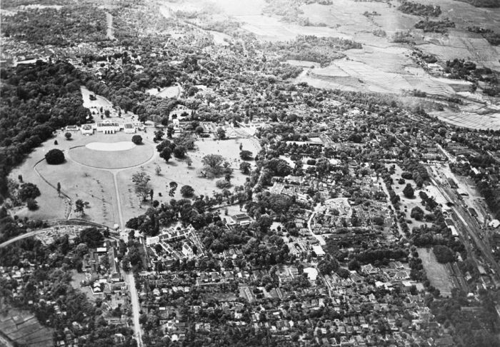 Foto. Luchtfoto van het paleis van de Gouverneur-Generaal in Buitenzorg